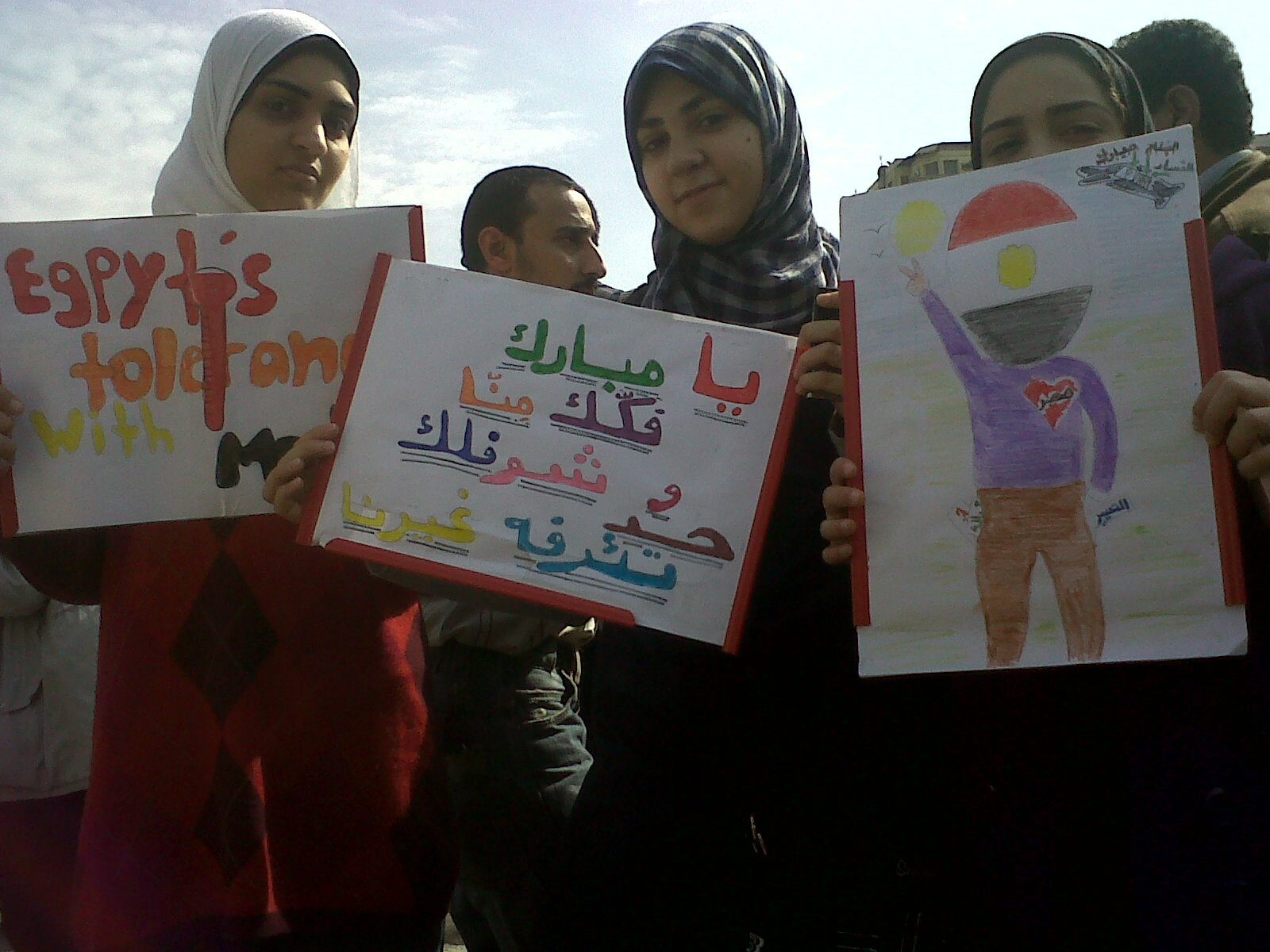 IMG00743-20110201-1112